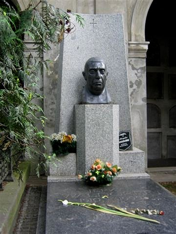 Jerzy Waldorff's monument (Powązki Cemetery)